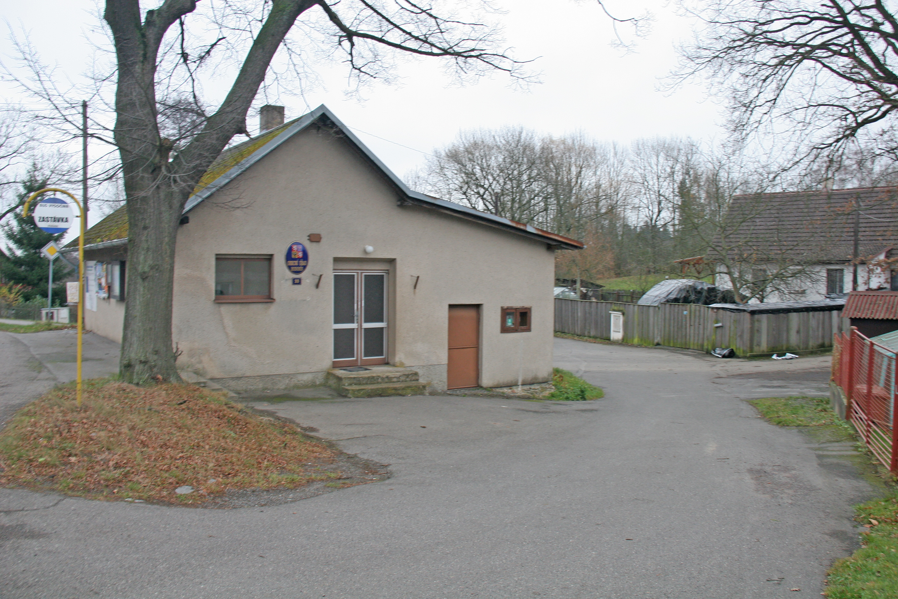 Hodonín obecní úřad